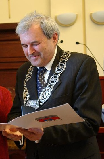 Konstanty Dombrowicz (prezydent Bydgoszczy), wręczenie Irenie Szewińskiej tytułu Honorowego Obywatela Bydgoszczy